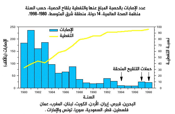 عدد حالات الحصبة والتغطية بلقاحها في بلدان شرق المتوسط سنة 1980-1998